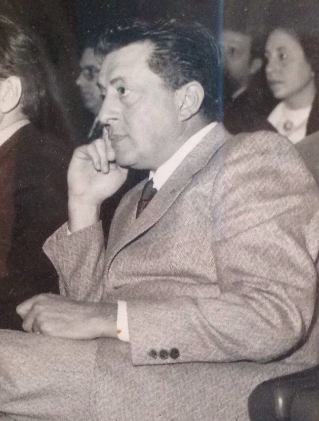 malacologo siciliano